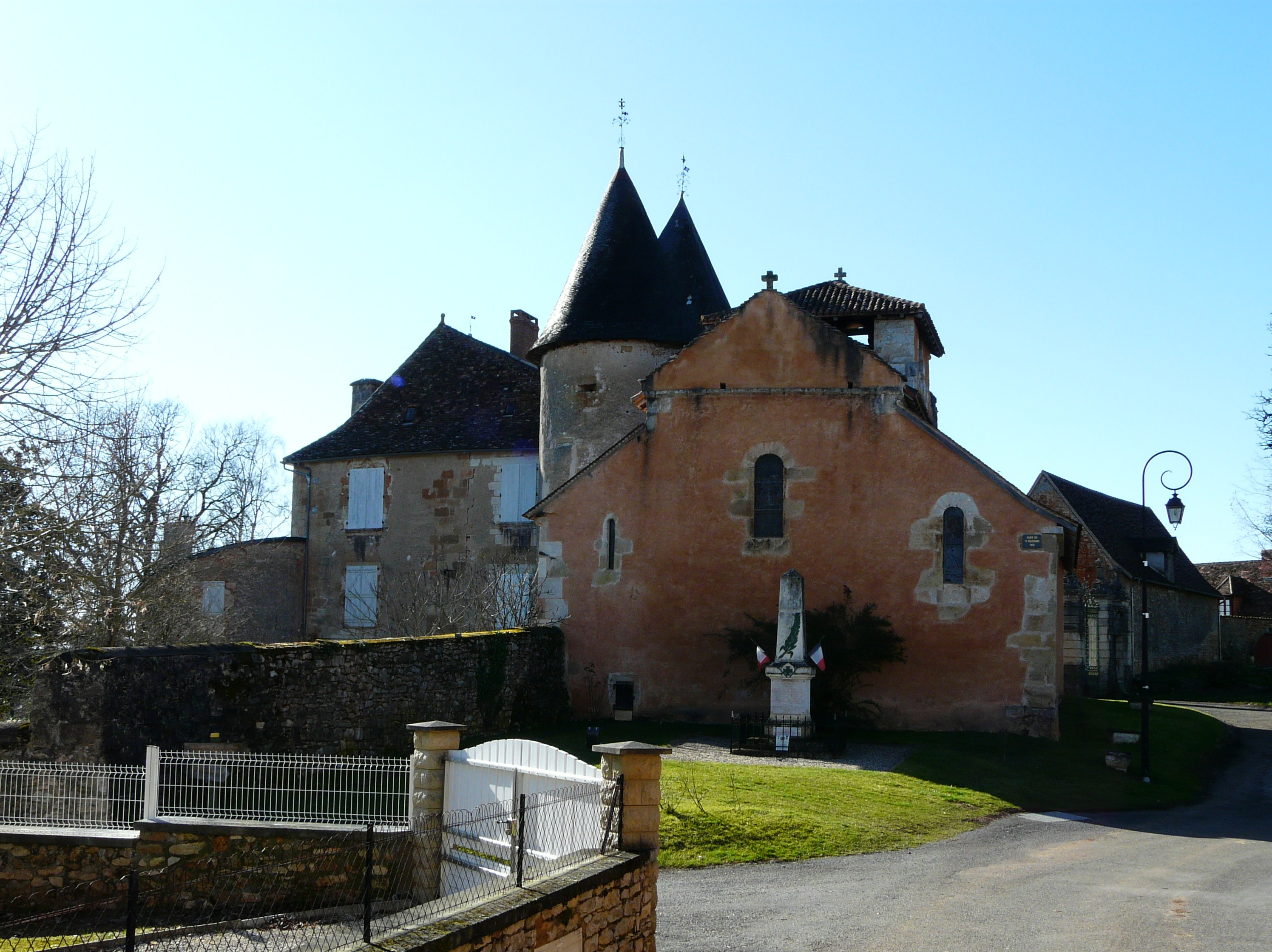 Le château et l'église Saint-Georges, Saint-Jory-las-Bloux, Dordogne, France.